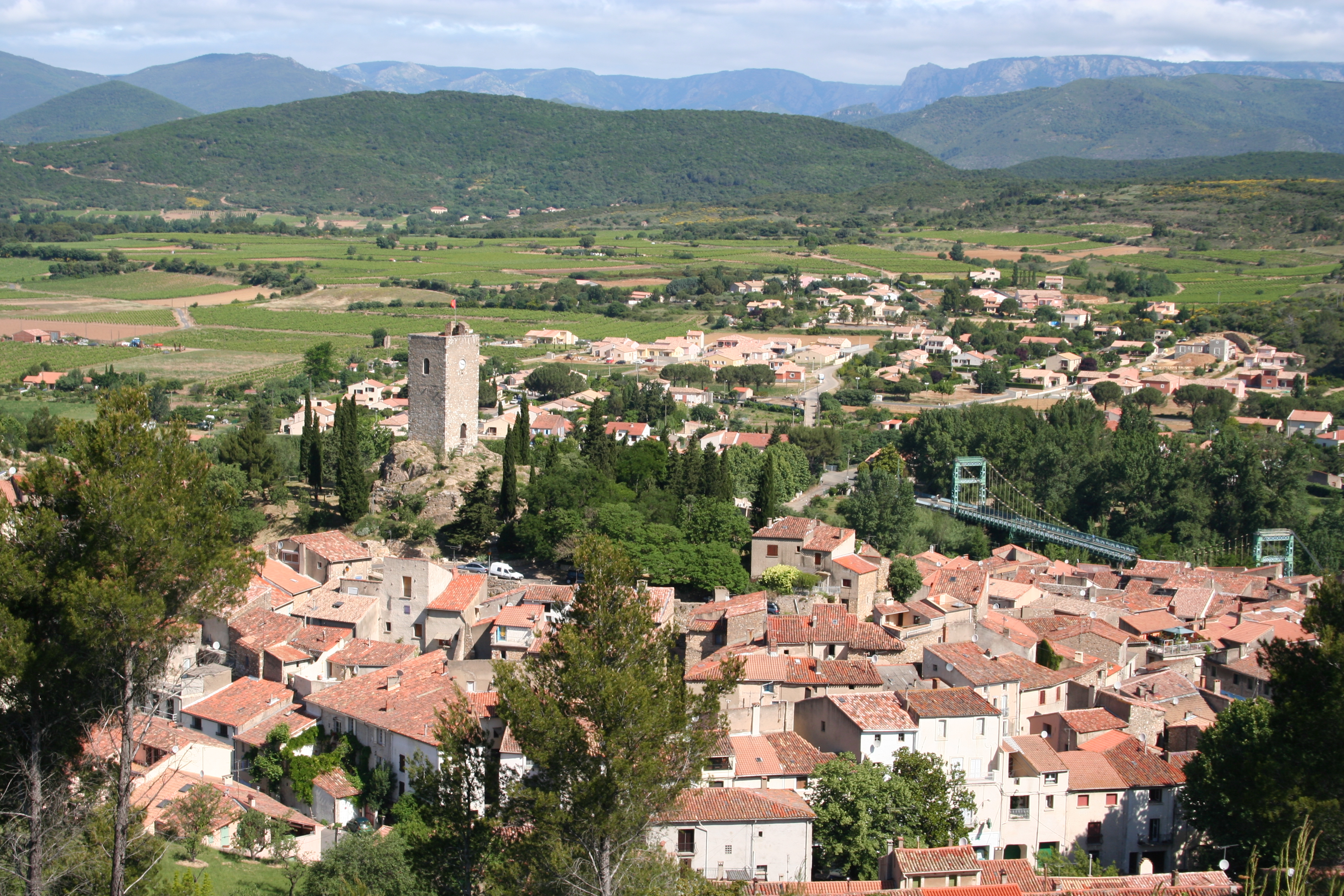 Vue d'ensemble de Cessenon-sur-Orb, Hérault, France (prise du "Trou du Corbeau").